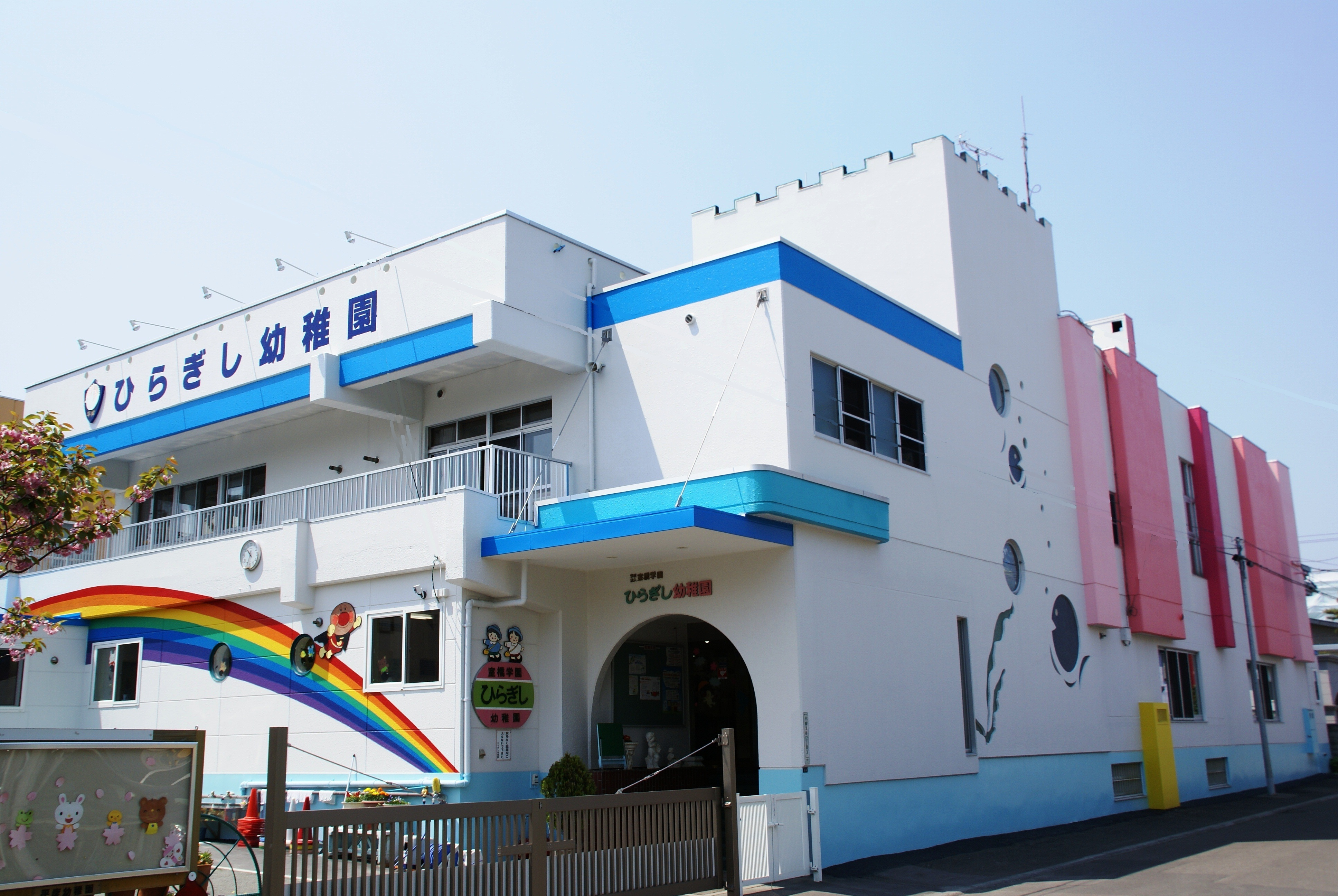 平岸幼稚園の園舎外観です